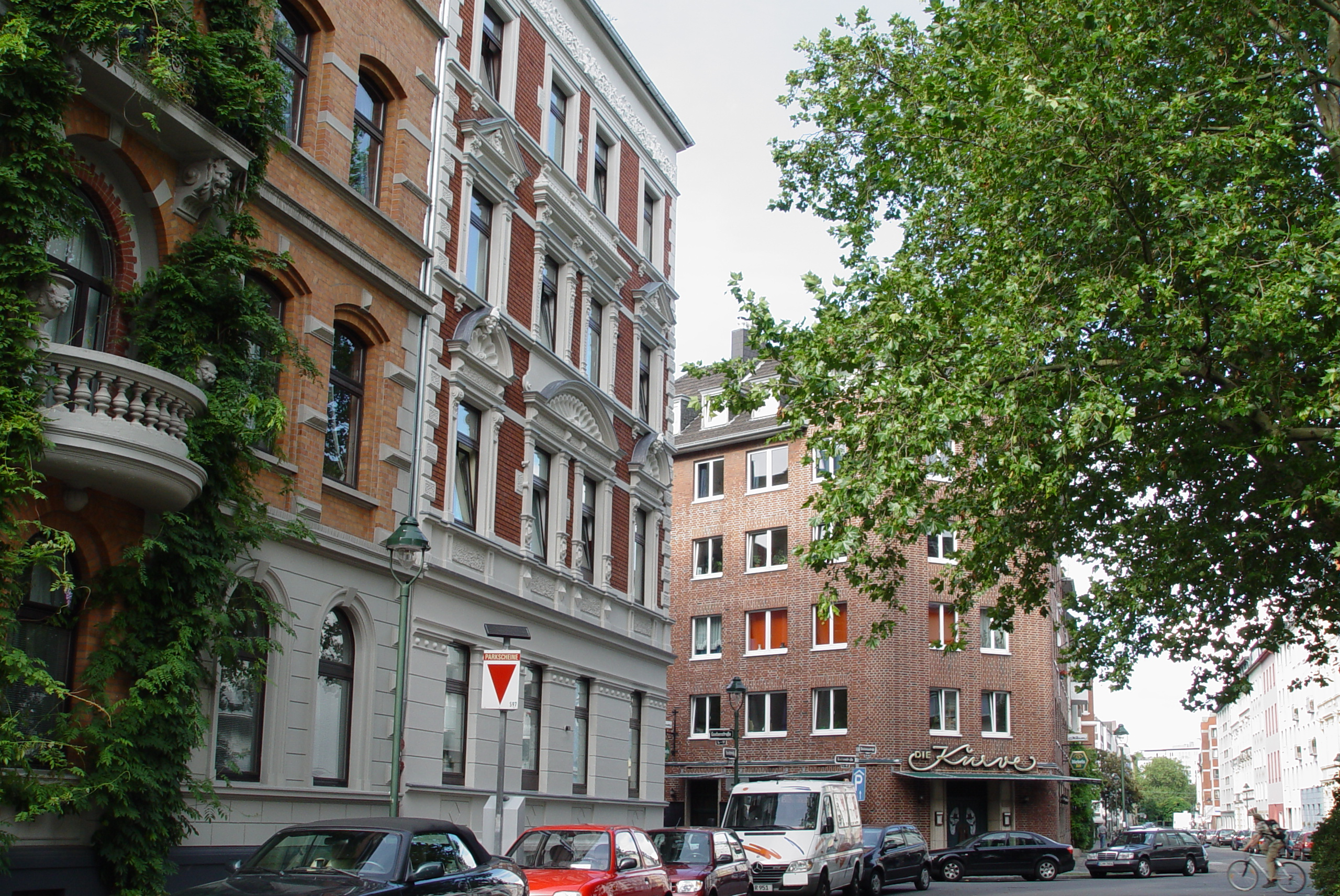 Pempelfort Rondell Parkstraße